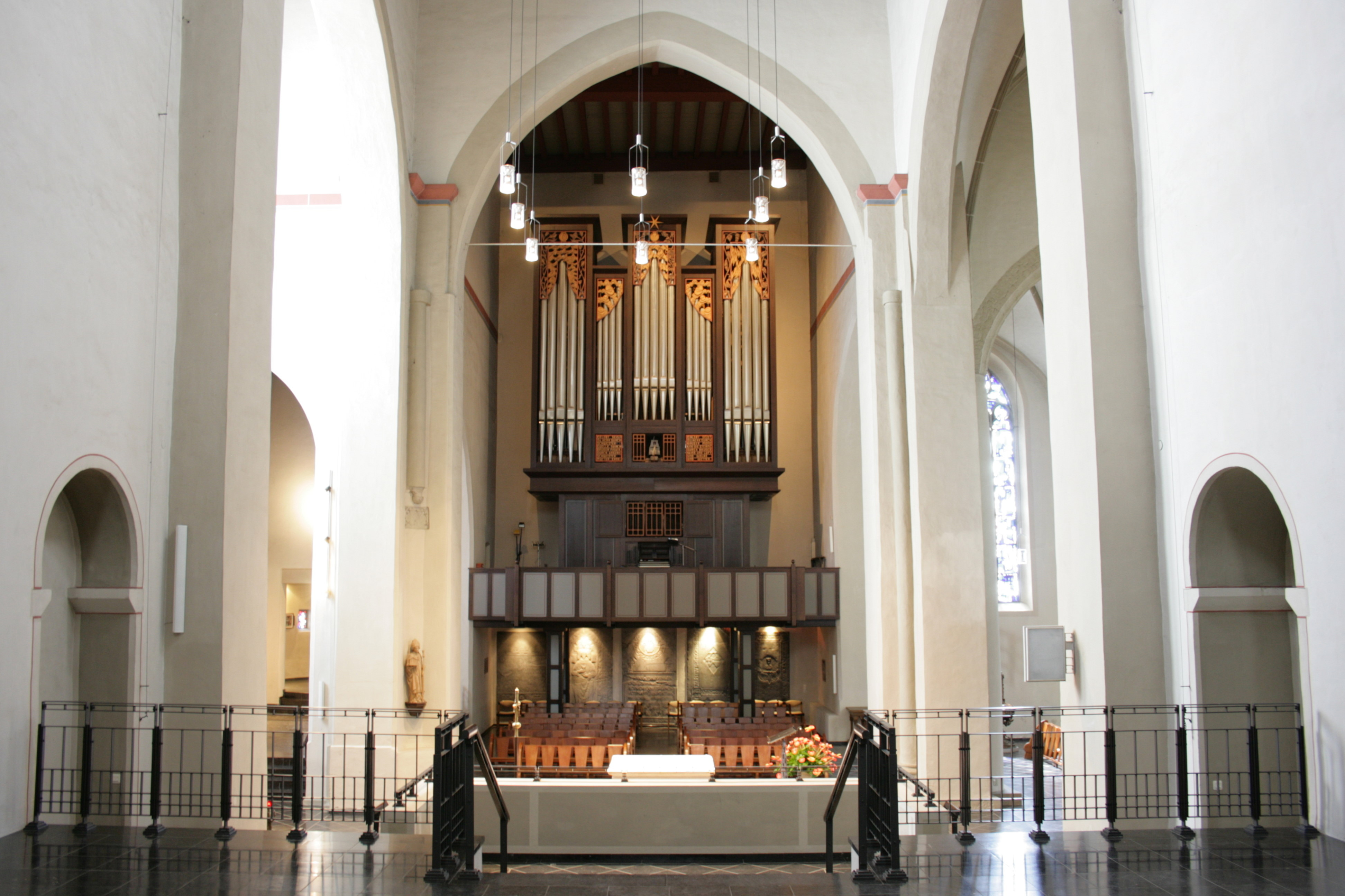 Sankt Martini in Emmerich am Rhein